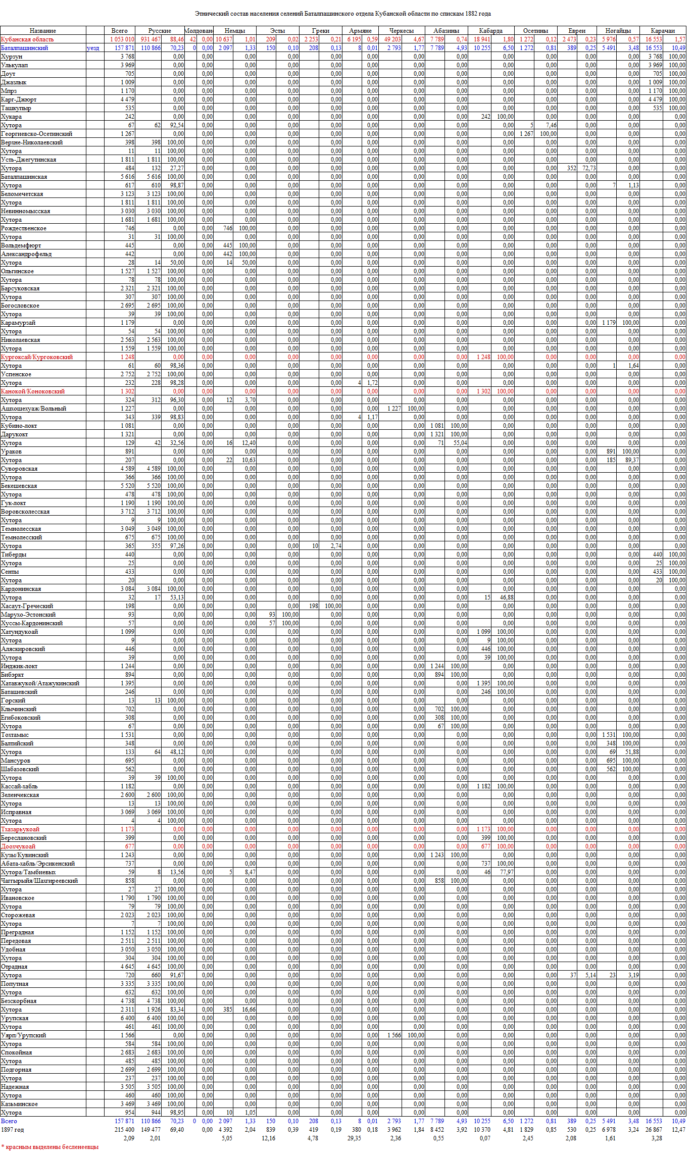 Население селений Баталвашинского отдела на 1882 год.